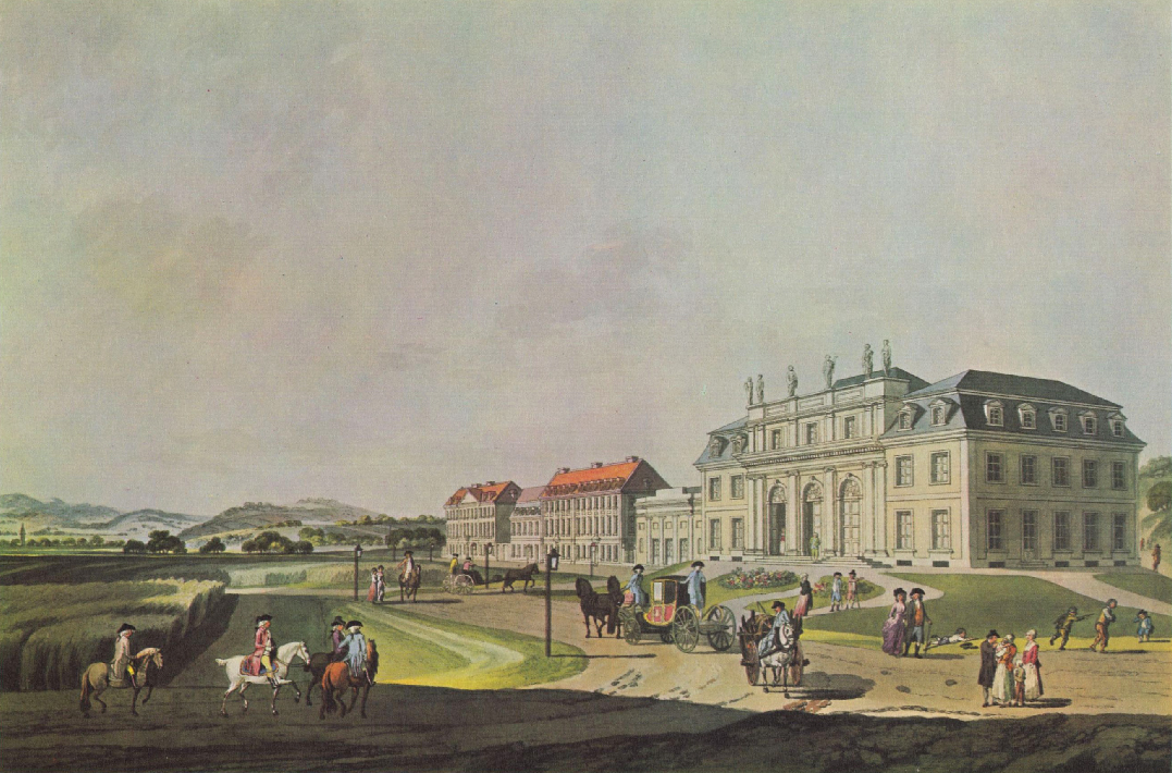 Aquarellierter Kupferstich der Redoute in Bonn-Bad Godesberg, Deutschland